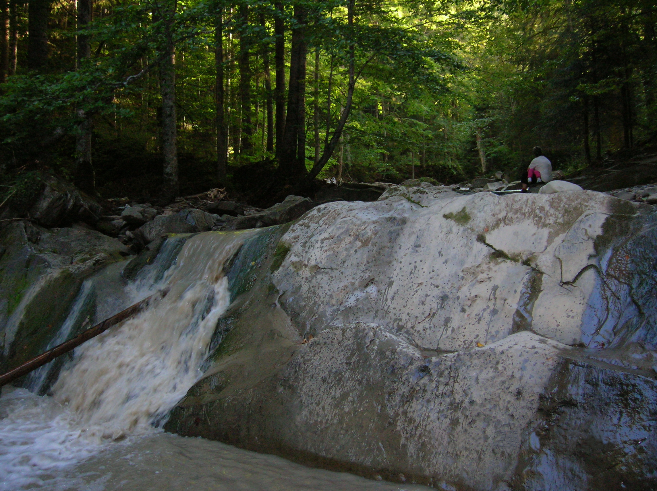 Munţii Tarcăului (Carpaţii Orientali, România)--Cascada Bolovăniş, treapta superioară